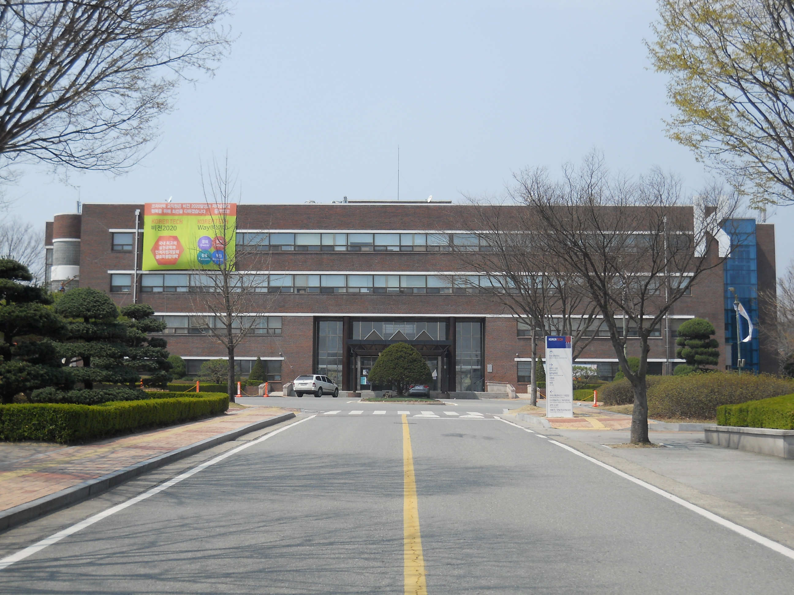 2015년 4월 인문경영관